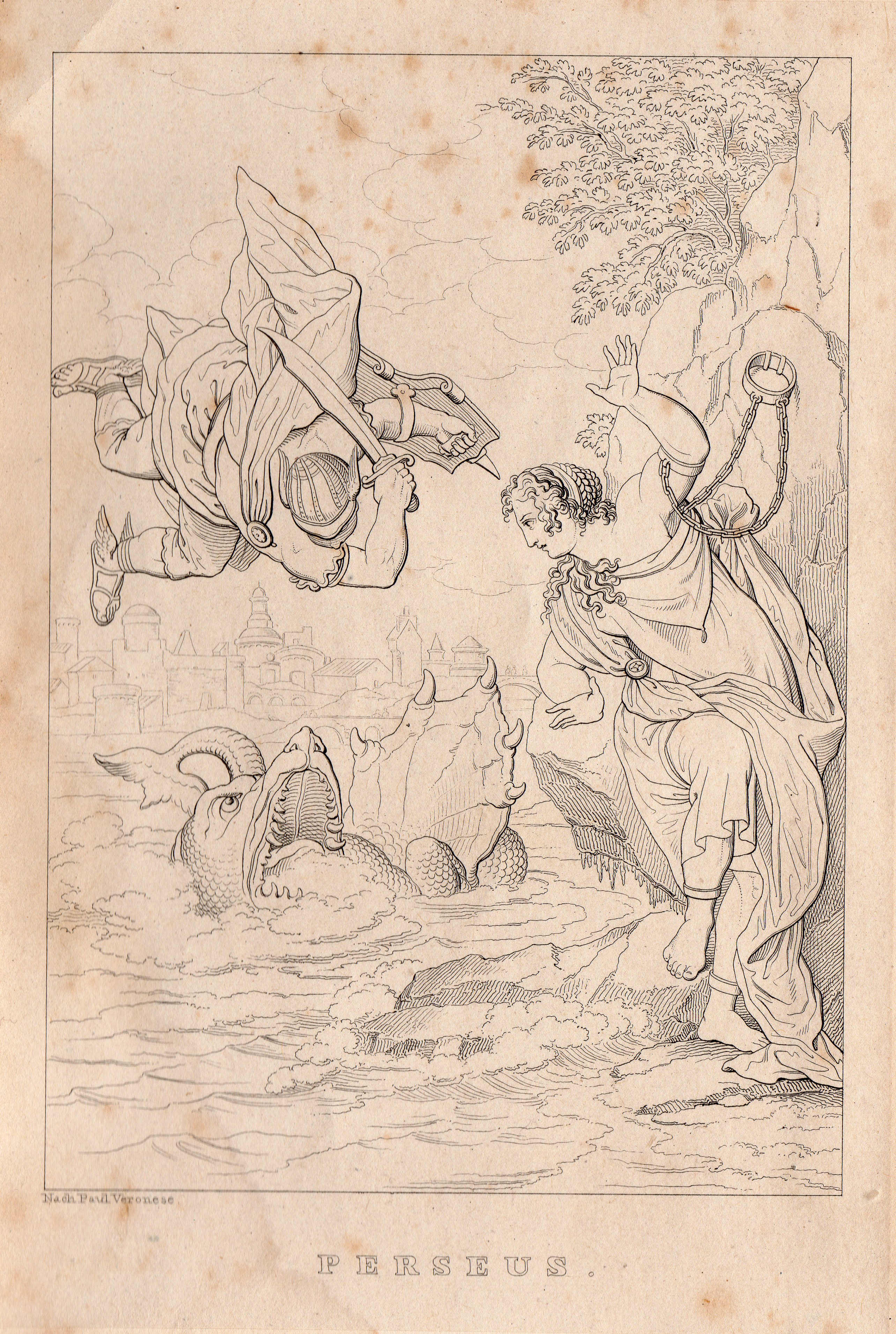 Perseus tötet das Seeungeheuer, Andromeda schaut zu. Stich nach einem Bild von Paolo Veronese. Titelbild zur Erstausgabe von Gustav Schwabs Sagen des klassischen Altertums. Band 1, Stuttgart 1838.